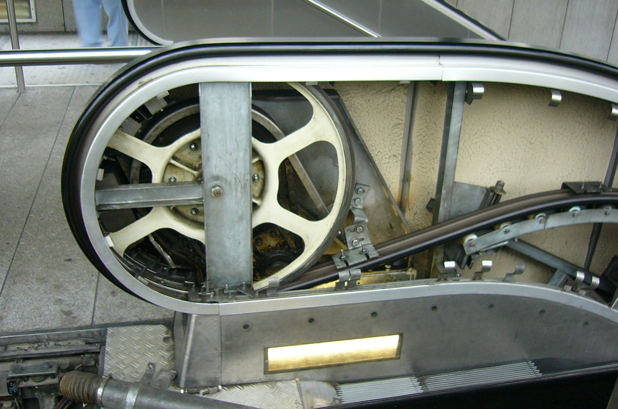 Escalator wheel (Antriebsrad für den Handlauf einer Fahrtreppe), seen in Munich, Germany.